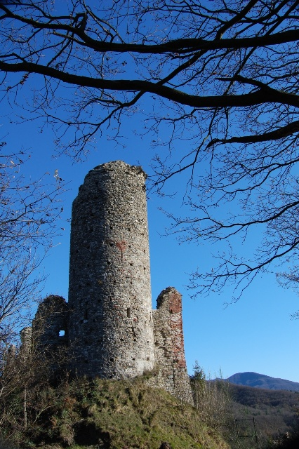 Ruderi del castello di Borgo Fornari, Ronco Scrivia, Liguria, Italia.